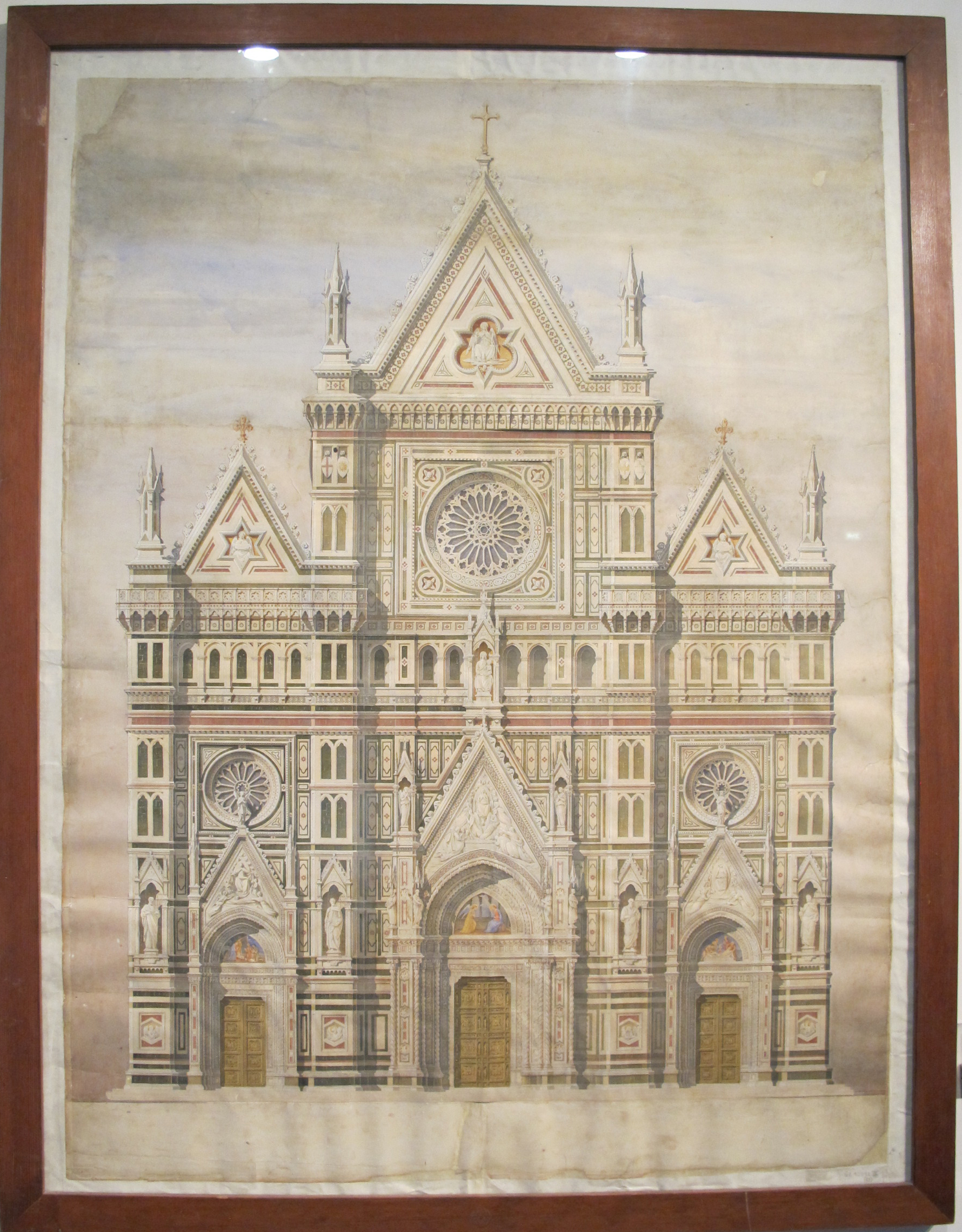 Emilio de fabris, prospetto per santa maria del fiore con cuspidi, 1866-67